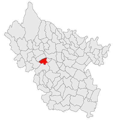 Categorie:Hărţi ale judeţului Buzău